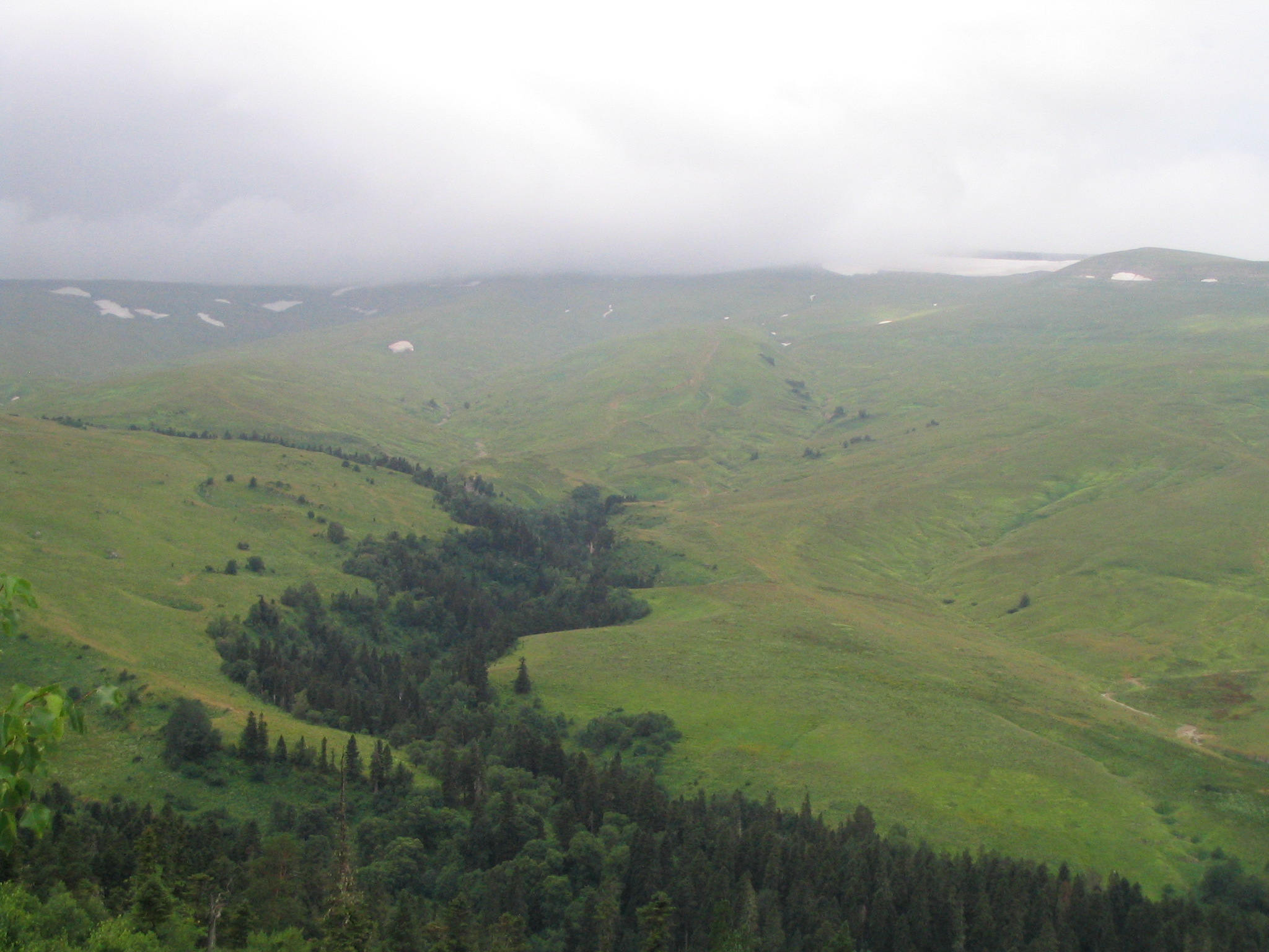 Lago-Naki, Adygeya, Russia. Урочище Лаго-Наки, Адыгея